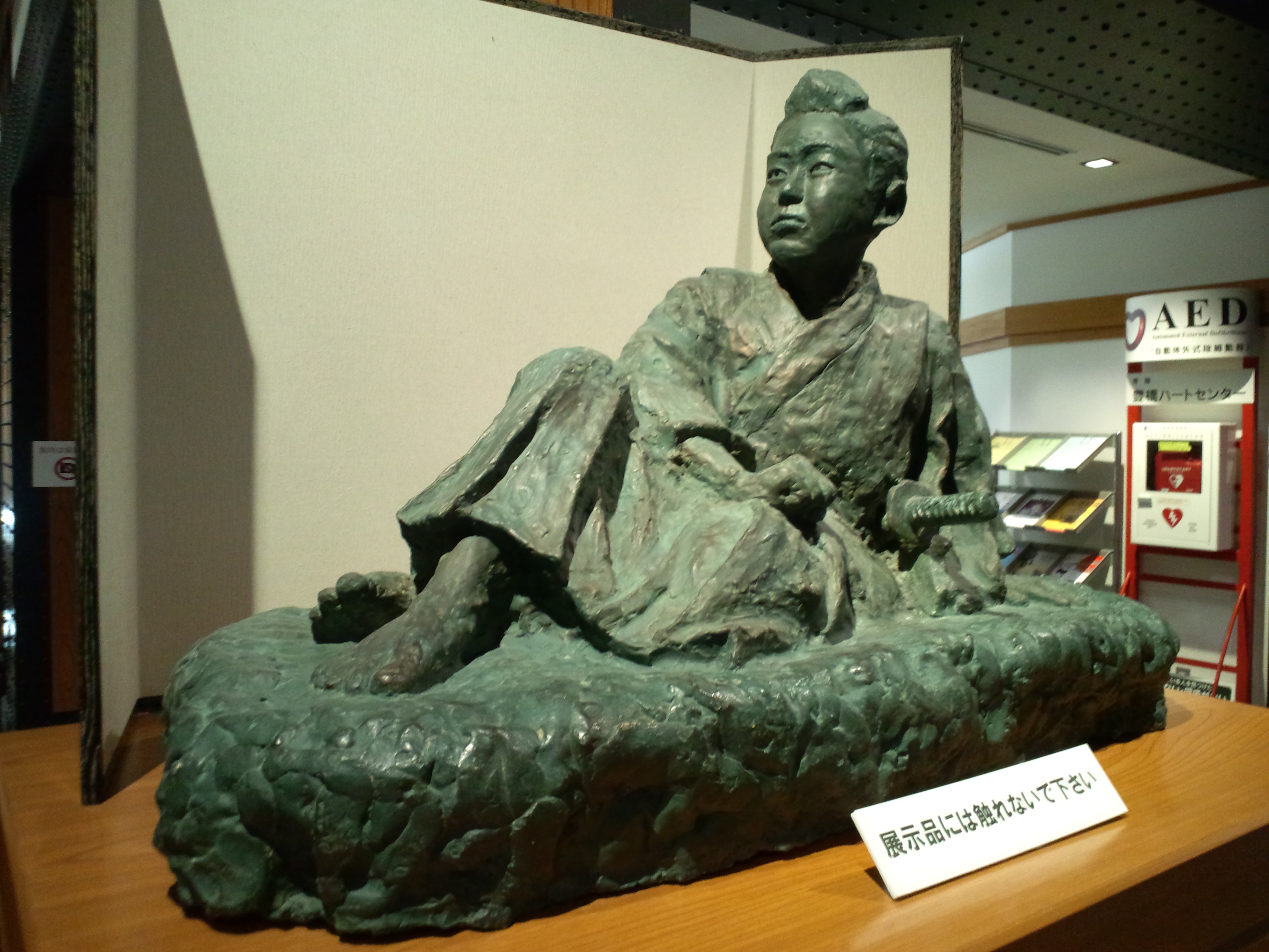 田原市博物館 渡辺華山立志像